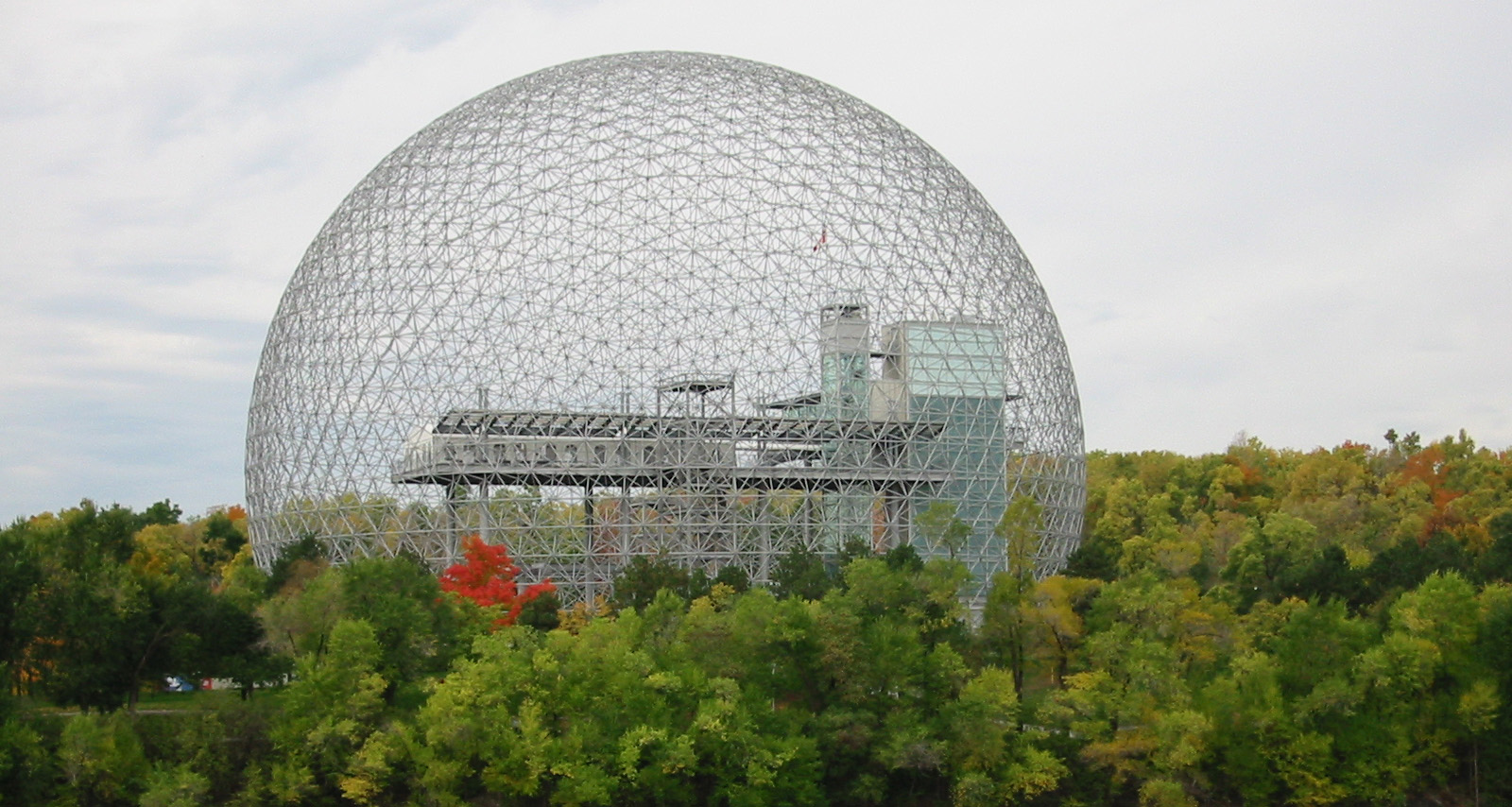 Biosphère Montréal